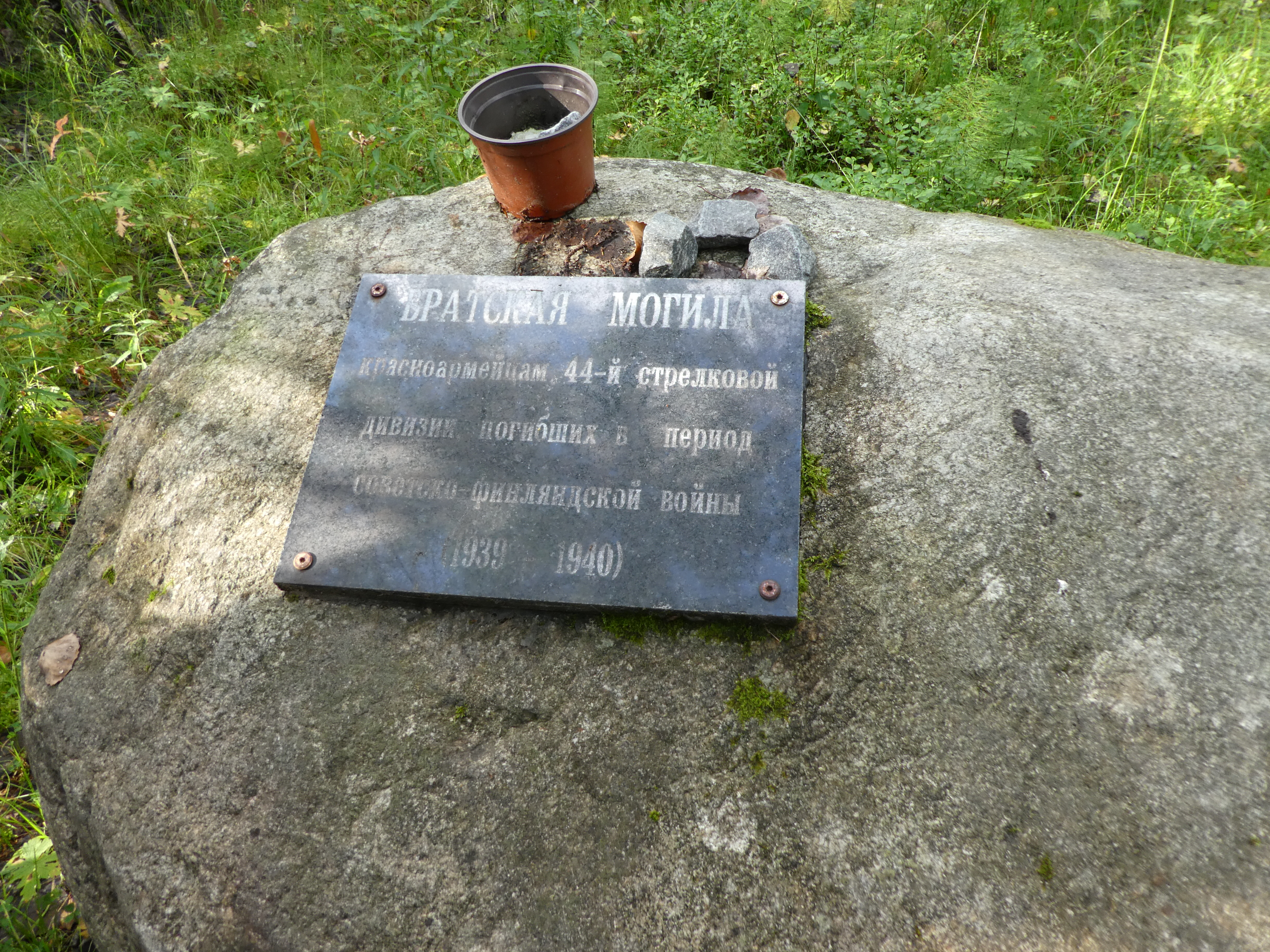 Vasovaara, Raatteentien vieressä Vuokkiniemen alueella Venäjällä, noin kilometri Suomen rajalta